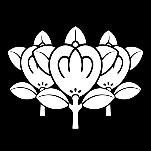 「三重ね橘」紋（染抜）